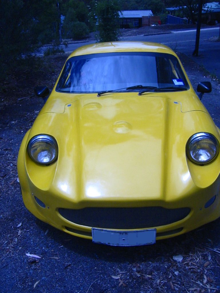 MiniJem Full Frontal